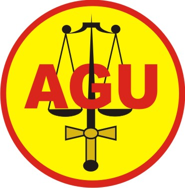 Logomarca da AGU (Advocacia-Geral da União) - AGU Logo